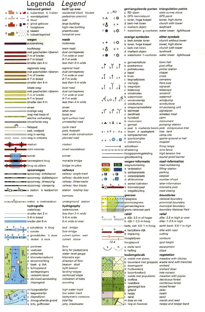 Legenda van de Topografische kaartbladen van Kadaster, sinds 1-1-2012 open geodata onder Creative Commons licentie.